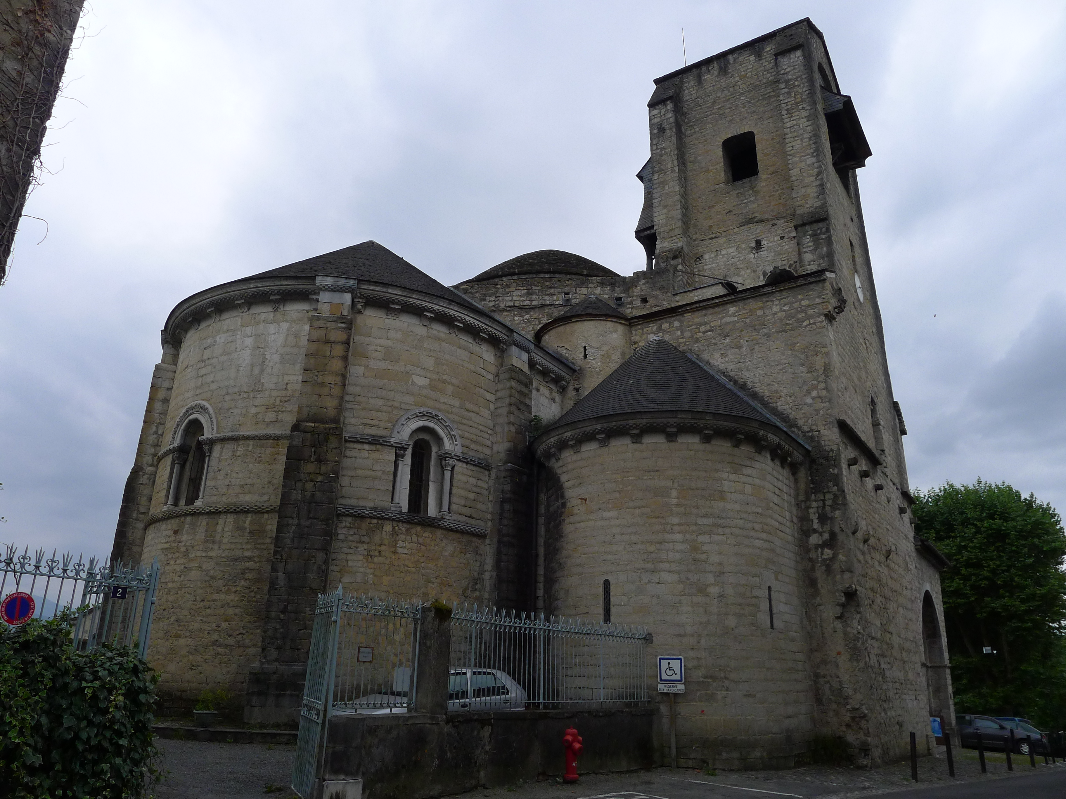 Vue du chevet de l'église Sainte-Croix